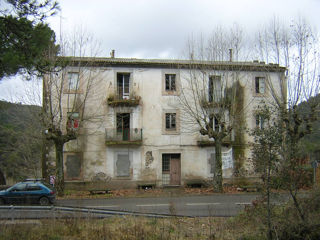 La Colònia (Monistrol de Calders, Moianès)